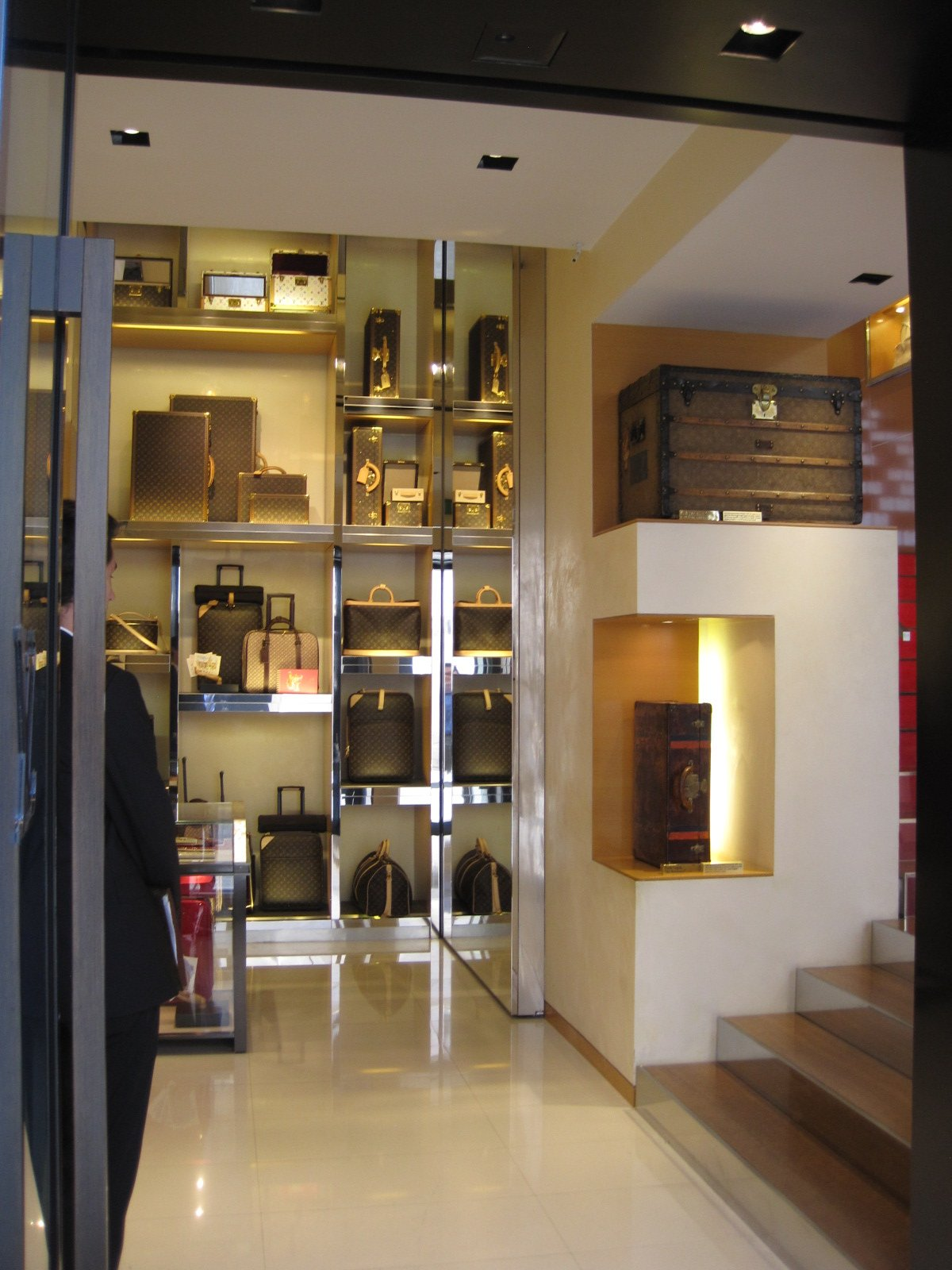 Boutique Louis Vuitton de Rome